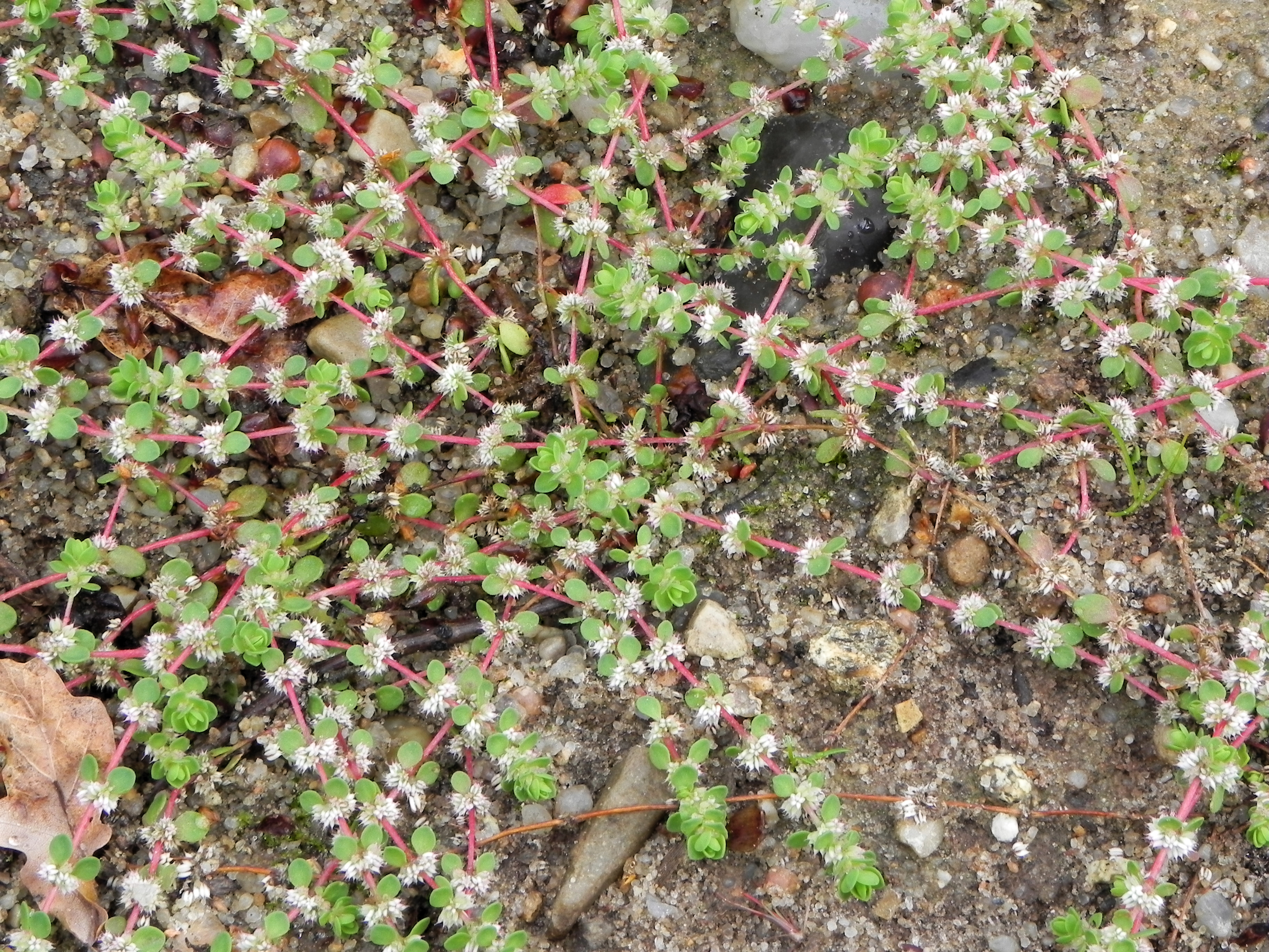 Quirlige Knorpelmiere (Illecebrum verticillatum) Südheide (Germany)